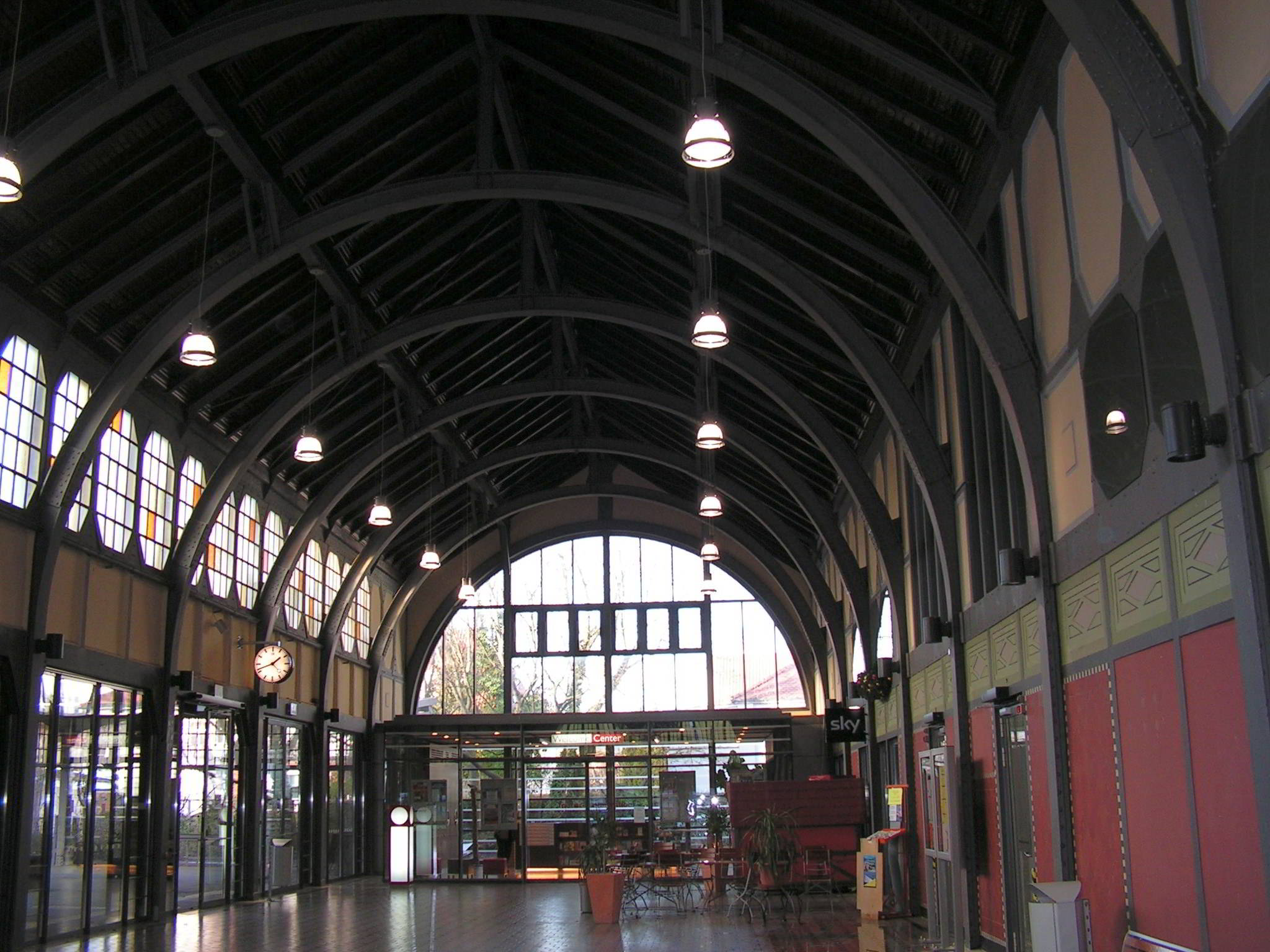 Lübeck-Travemünde / Strandbahnhof / Innenansicht 2012